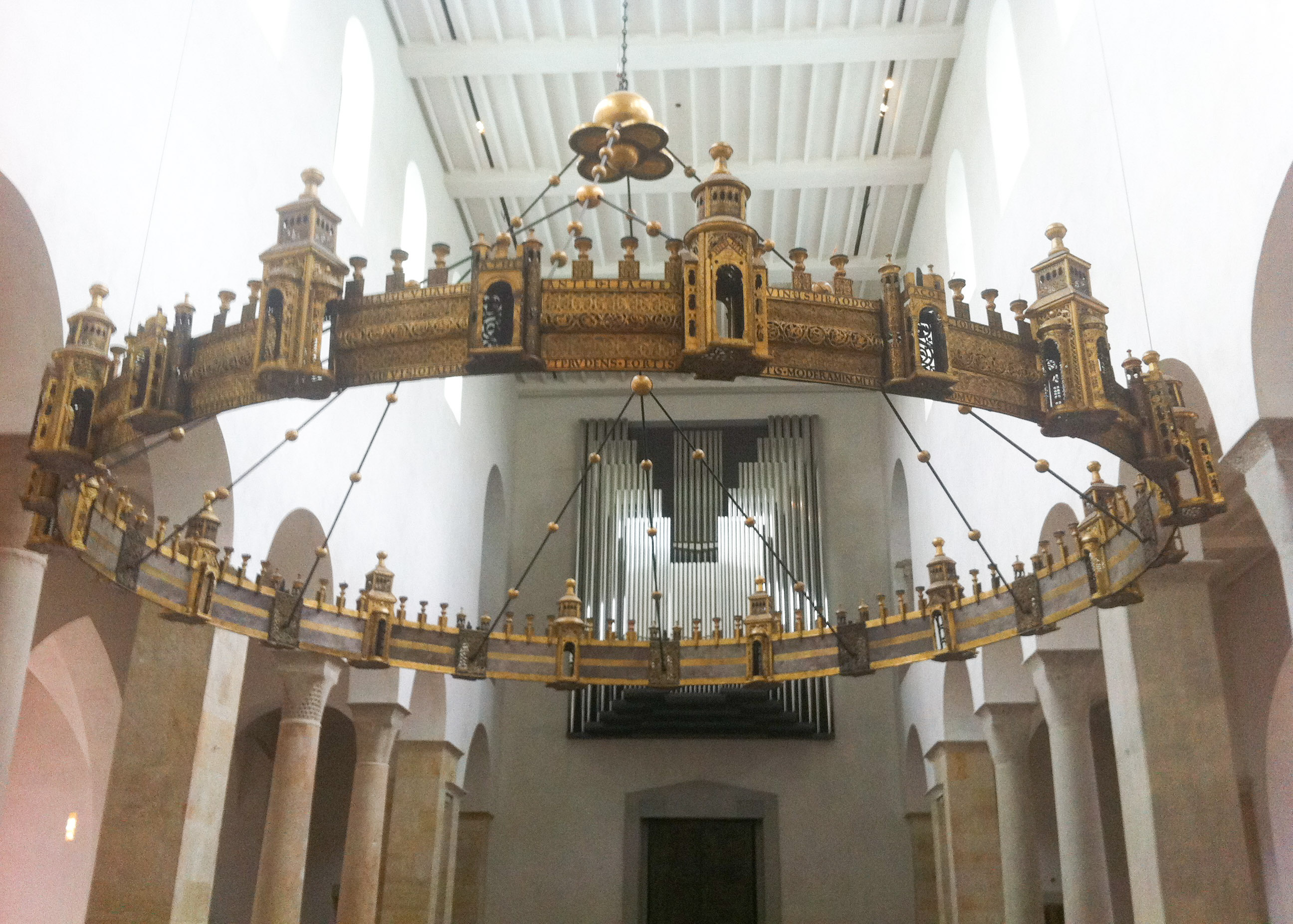 Hildesheimer Dom, Heziloleuchter